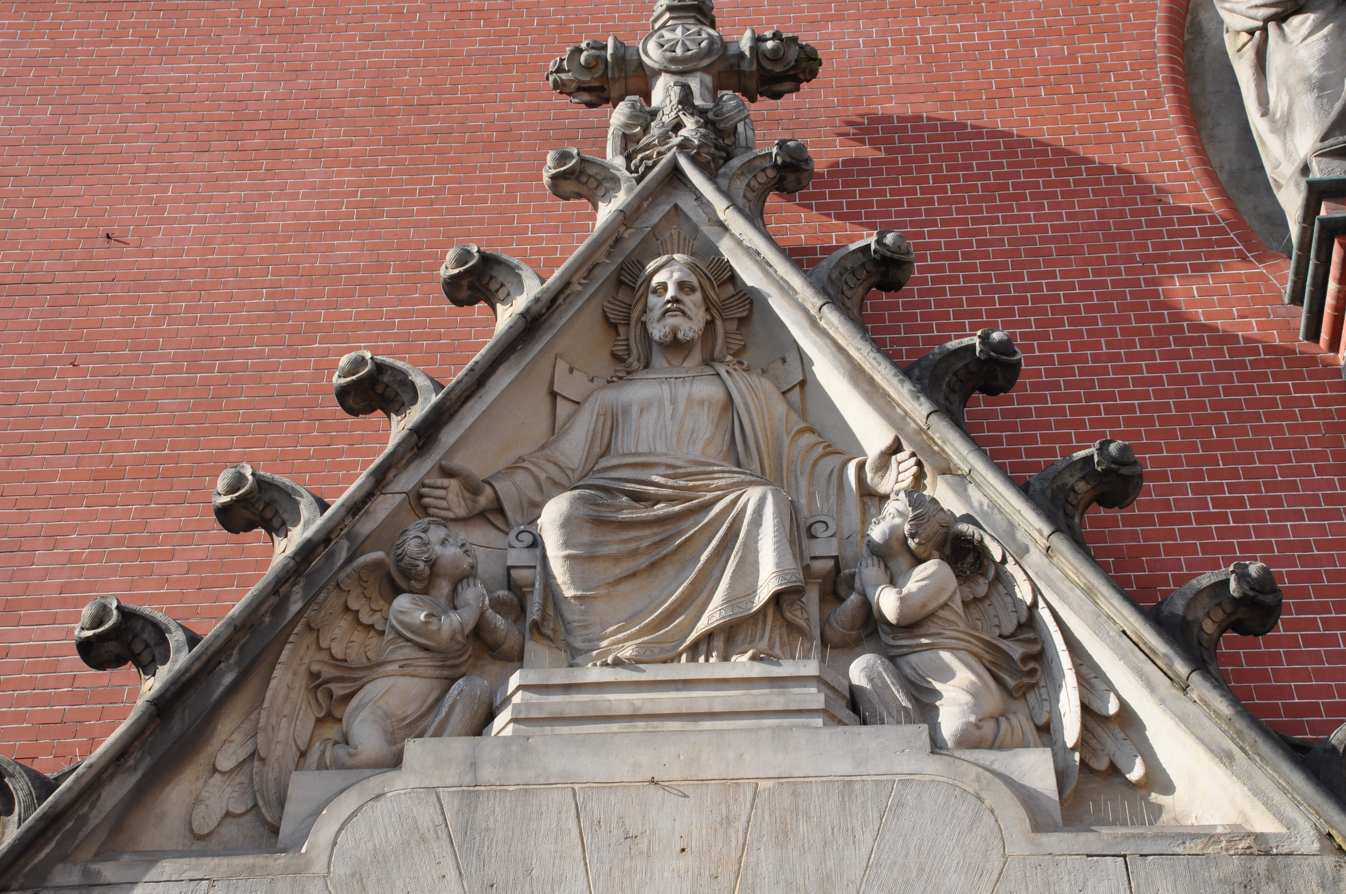 Altenburg, ev. Brüderkirche, Christusrelief am Portal